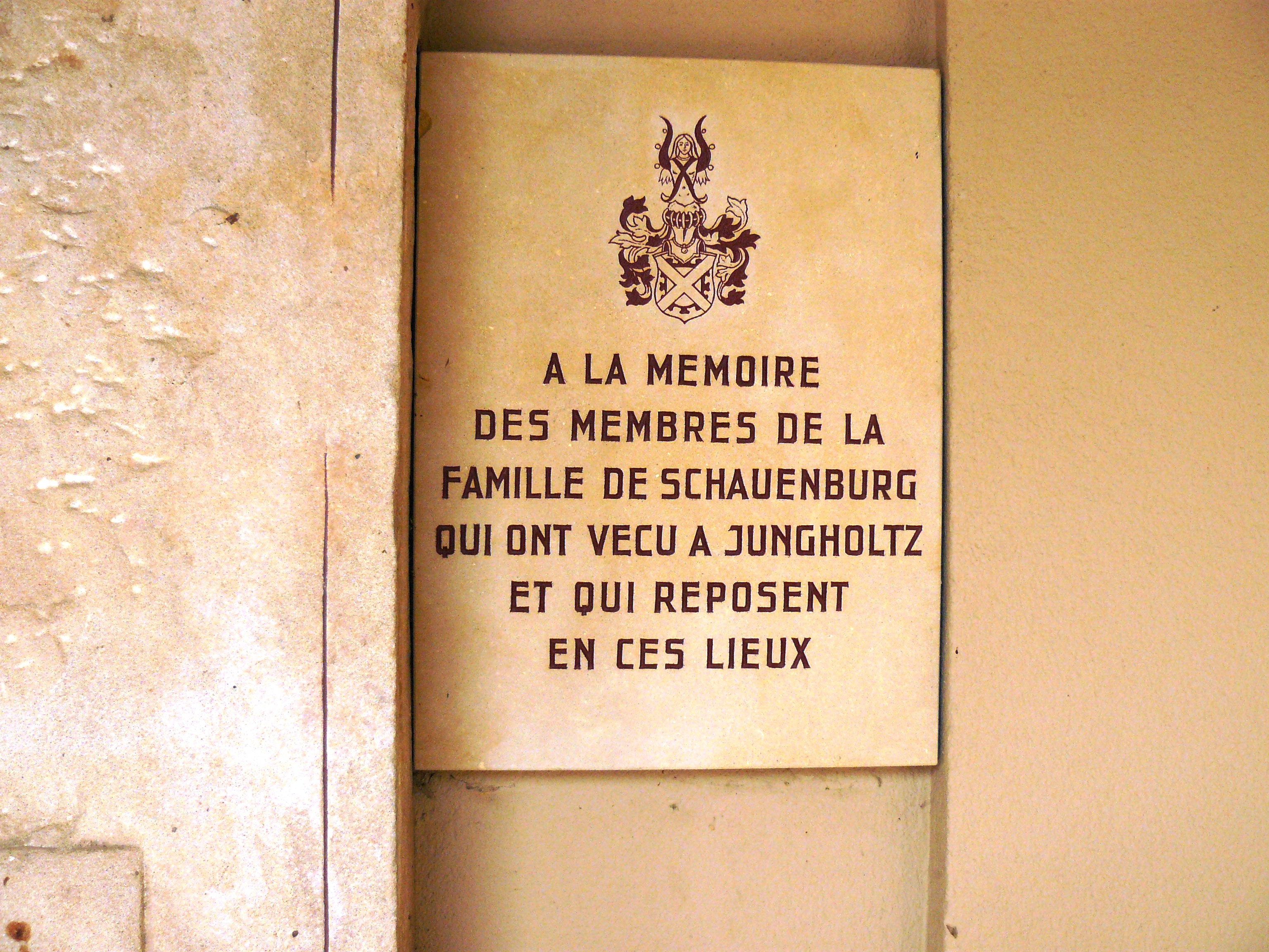 Dalle funéraire des Schauenburg exposée dans la galerie du cloître de la basilique du Prieuré de Thierenbach (Haut-Rhin).